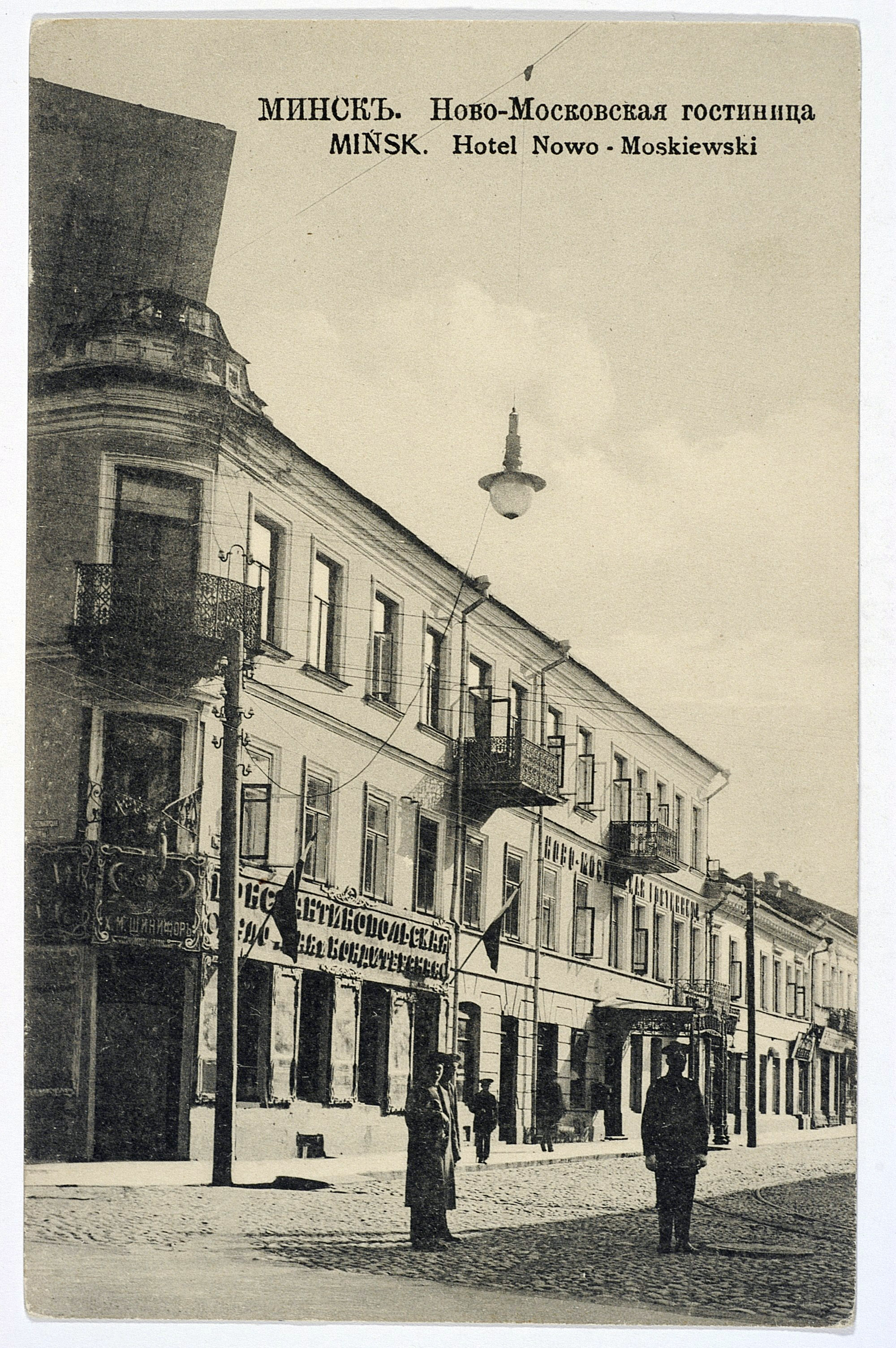 Мінск. Нова-Маскоўская гасцініца. Рог Захар'еўскай і Губернатарскай, 84/28, дом Мельцара.